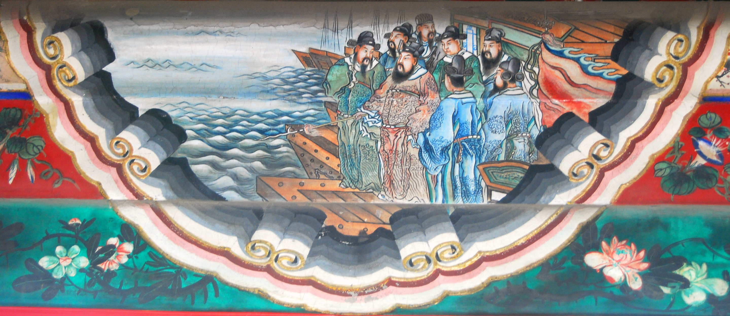 Tào Tháo làm thơ tại Xích Bích - Di Hòa Viên